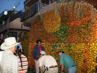 Arcos de frutas hechos por campesinos picture taken by Jorge Velez while visiting Anolaima.